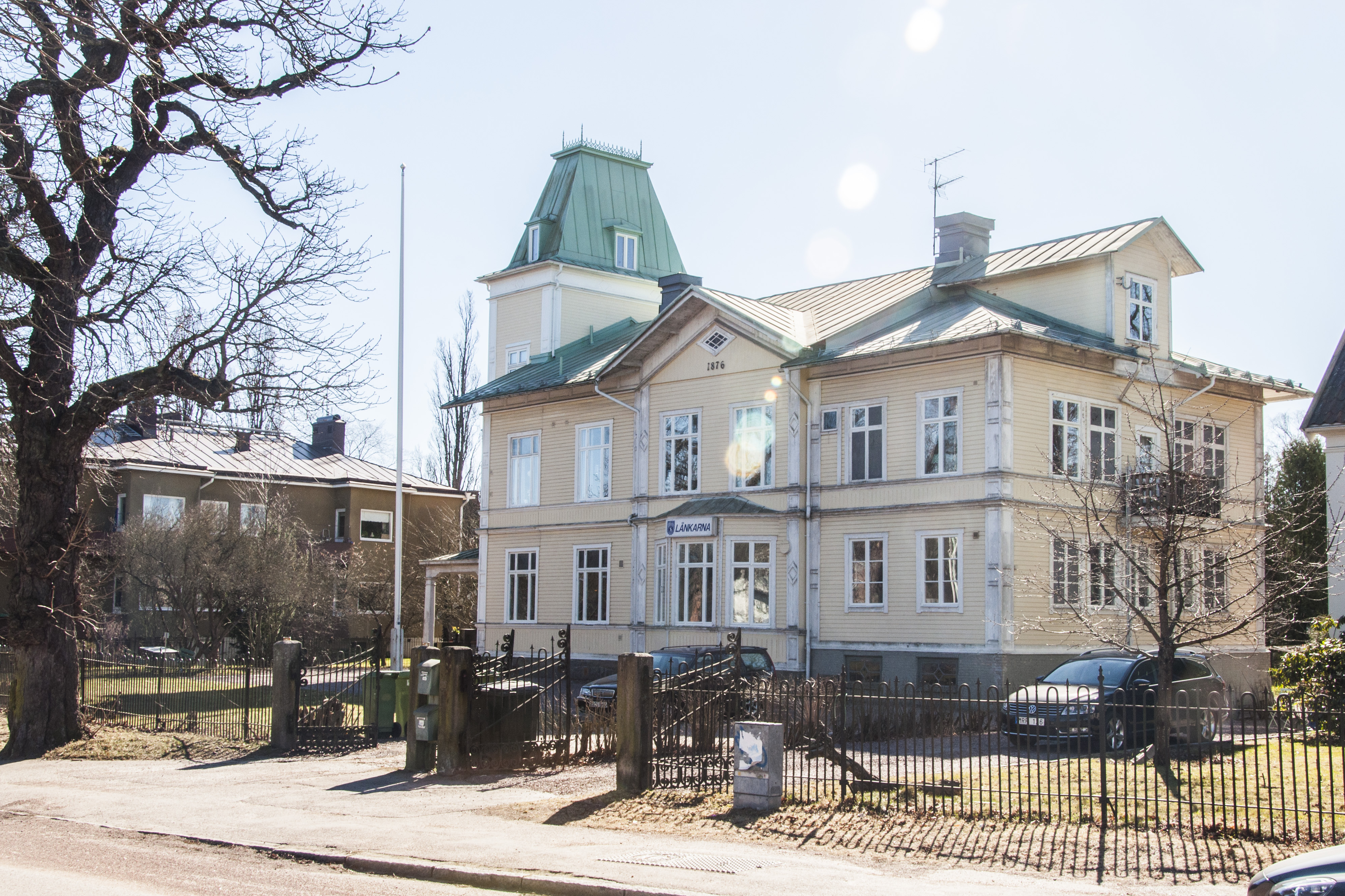 Laxen 5, Älvgatan 21, Karlstad. Byggnadsår 1876. Arkitekt Theodor Högström (tornbyggnad ändrad 1891) Ursprungligen Fitinghoffska villan, senare Haakens villa. Villan har även tjänstgjort som hushållsskola under första halvan av 1900-talet. Idag Länkarna